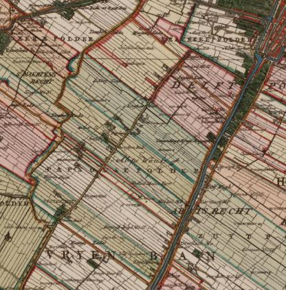 Papsouwse of lage Abtswoudse polder.